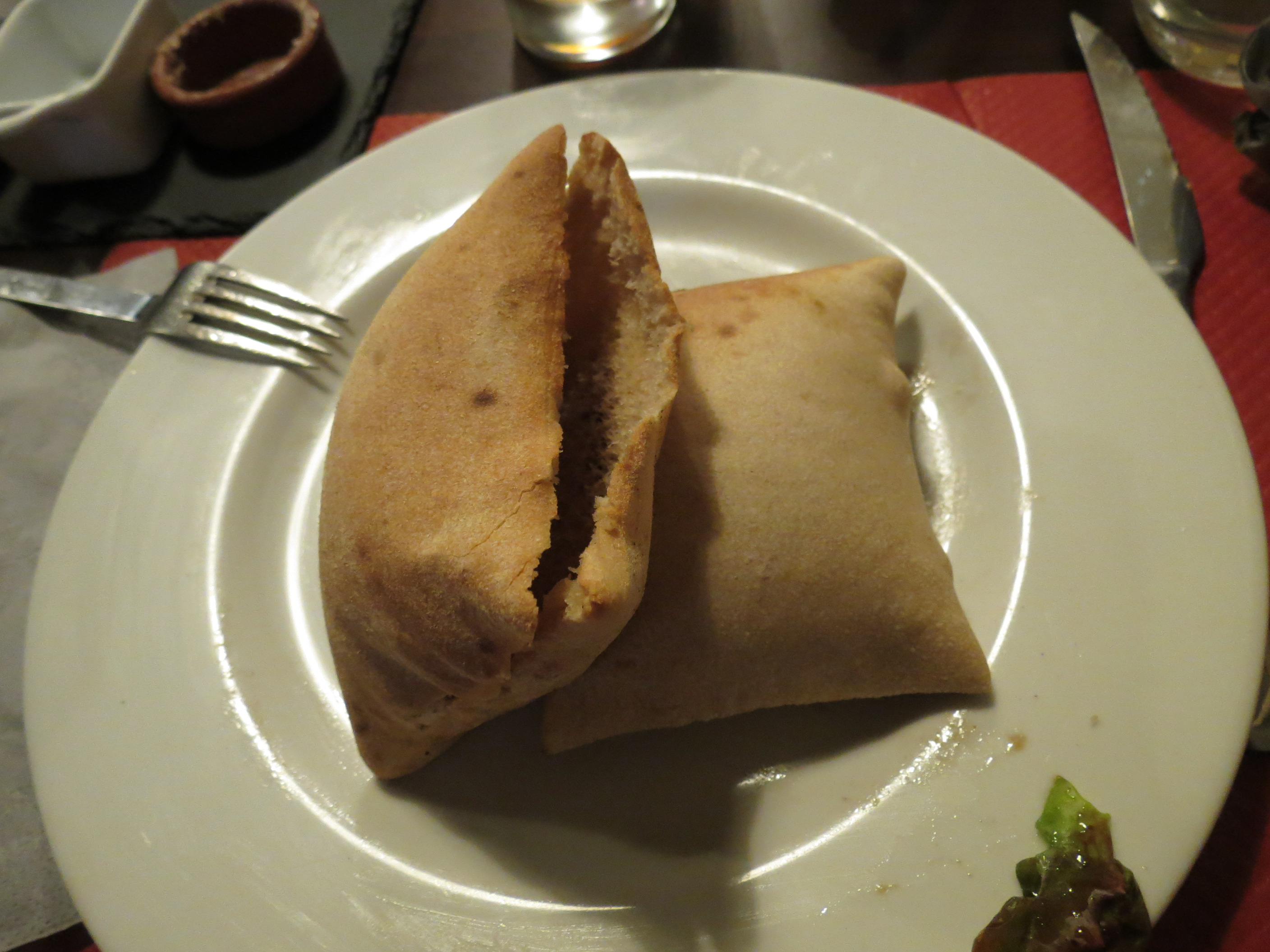 Fouées angevines.